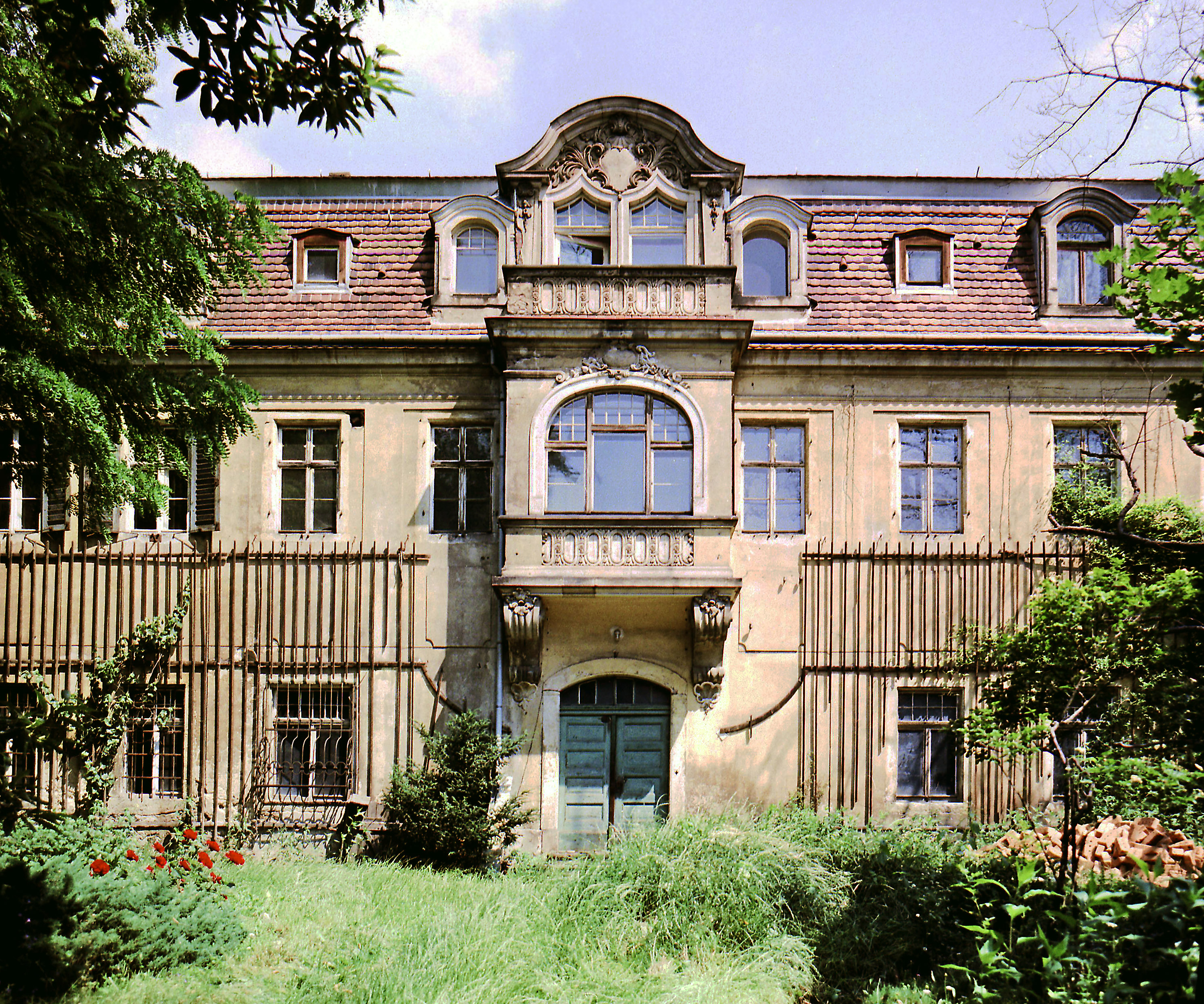 11.07.1987 DDR 8122 [01445] Radebeul-Oberlößnitz, Eduard-Bilz-Straße 49 (GMP: 51.109885,13.676674): Haus Albertsberg, historisches Weingut. Im 17. Jh. wurde hier ein umfangreicher Weinberg angelegt. Das heute vorhandene, aber mehrfach umgebaute Weinberghaus wurde um 1778 errichtet. Baumeister Moritz Ziller baute es 1862 in eine herrschaftliche Villa um. 1898/99 erfolgt unter dem Dresdner Architekten Oskar Menzel die Barockisierung des Hauses. Bei diesem letzten Umbau erhielt auch das Hauptportal seine gegenwärtige neobarocke Gestaltung. Sicht von Süden. [R19870705B14]19870711151NR.JPG(c)Blobelt